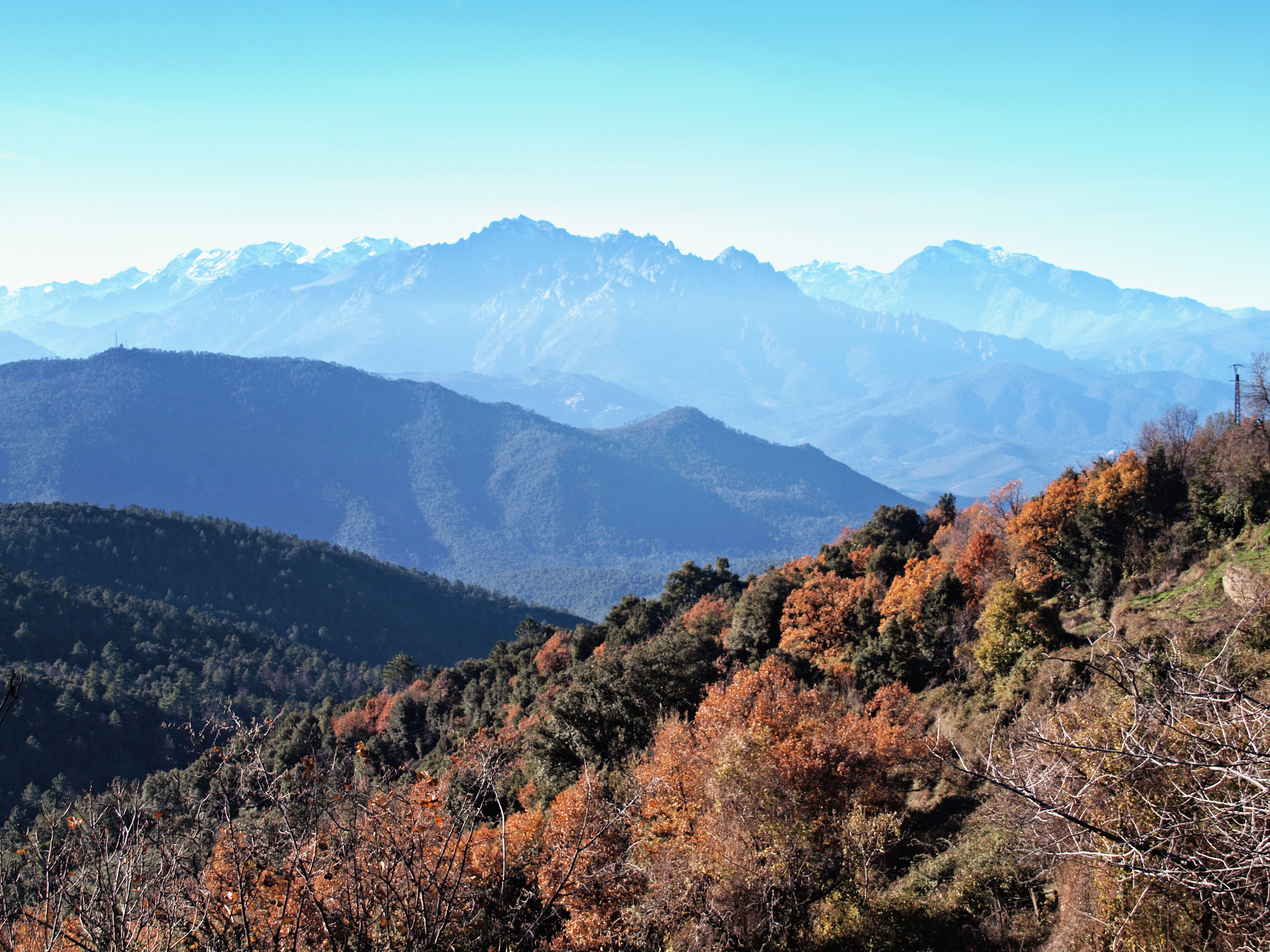 Castineta (Corsica) - Vue sur la vallée et les Aiguilles de Popolasca depuis Castineta Sottana